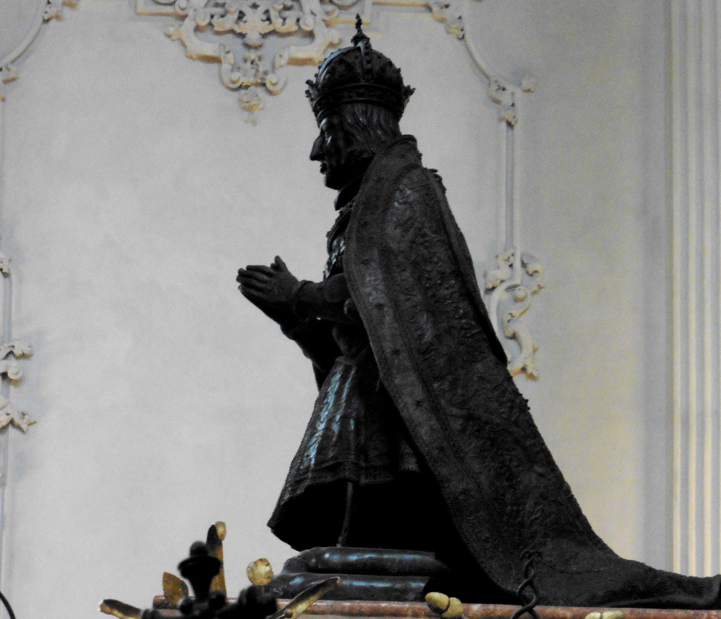 Bronzefigur von Kaiser Maximilian I. (1459–1519) auf seinem Grabmal in der Hofkirche in Innsbruck. Ansicht von Osten.